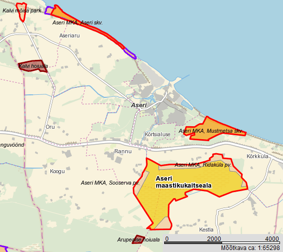 Aseri MKA kaart. Põhineb Maa-ameti kaardil.